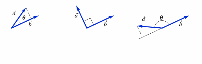 vetor